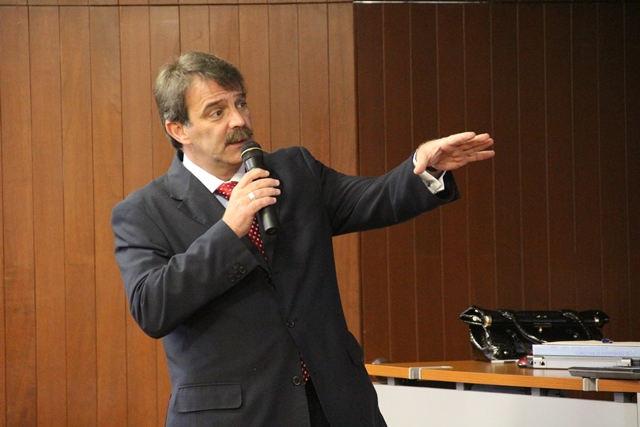 Rodolfo Camarosano Bersani hablando en el ITESM-Campus Ciudad de Mexico